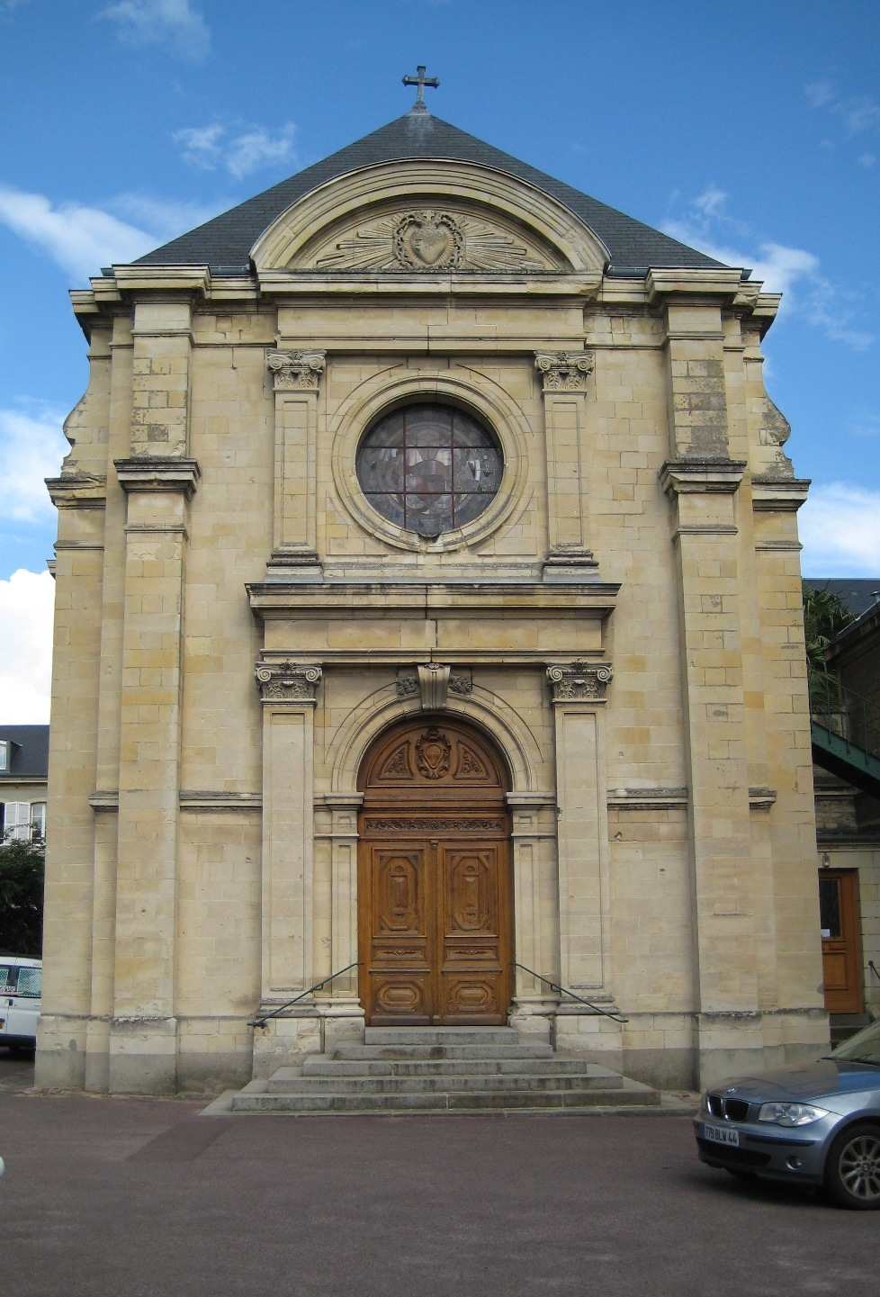 Chapelle du monastère de la Visitation de Caen, construite entre 1890 et 1892.